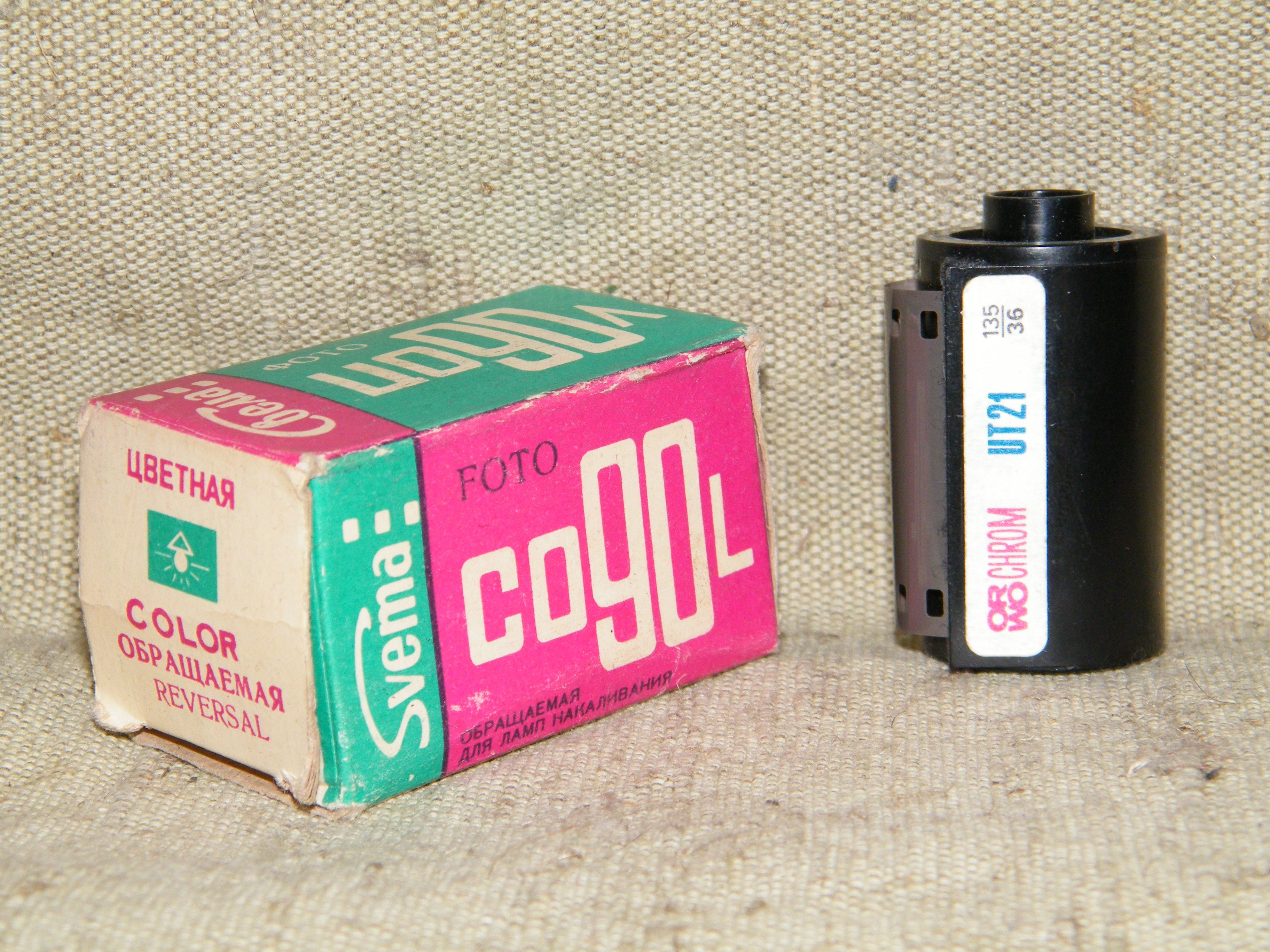 Фотоплёнки Свема